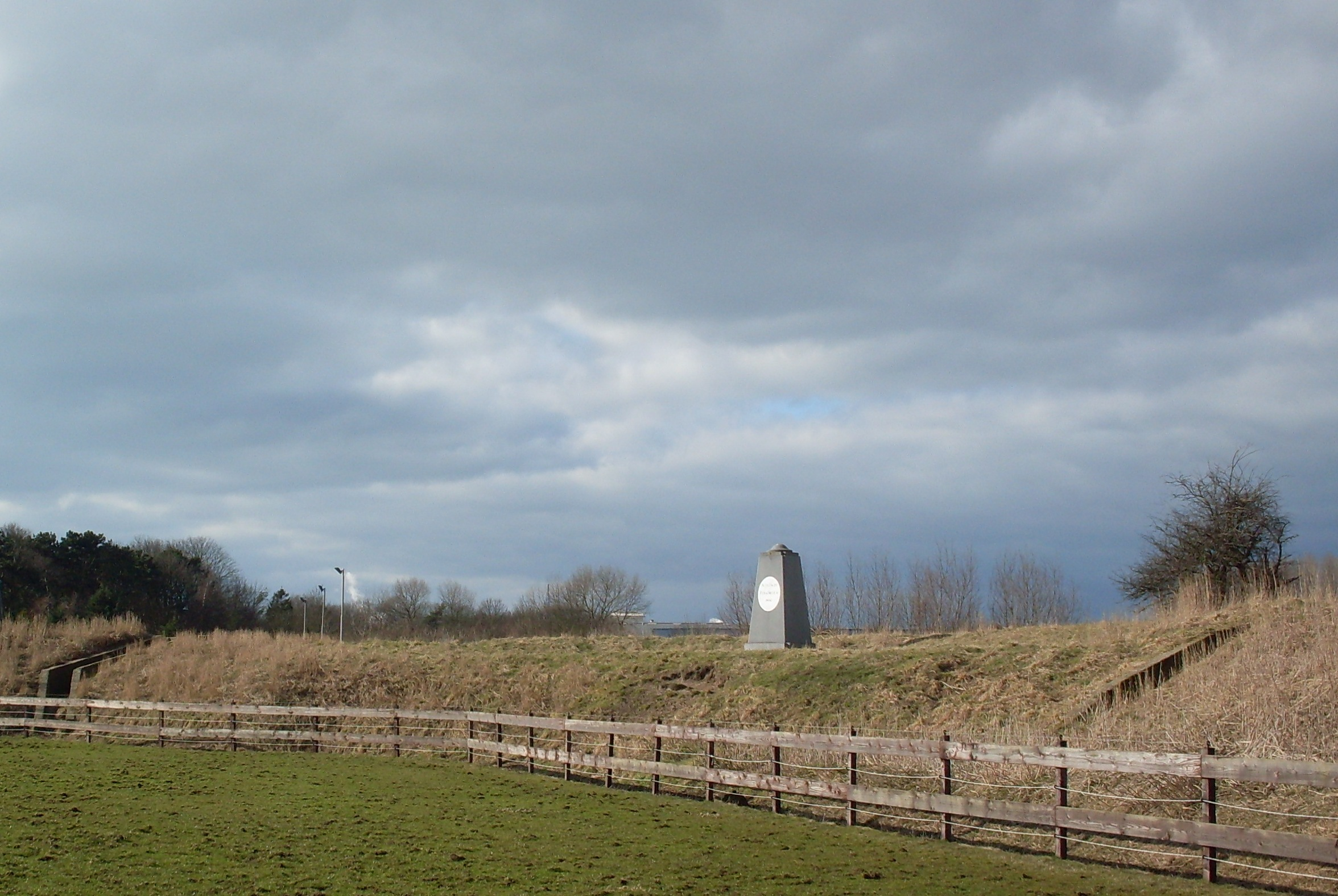 Obelisk op versterking Krayenhoff, Creutzberglaan.